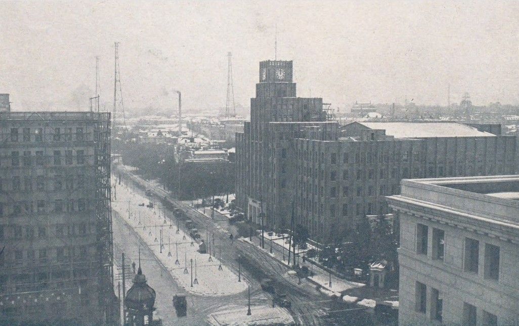 東京市公会堂 のち日比谷公会堂